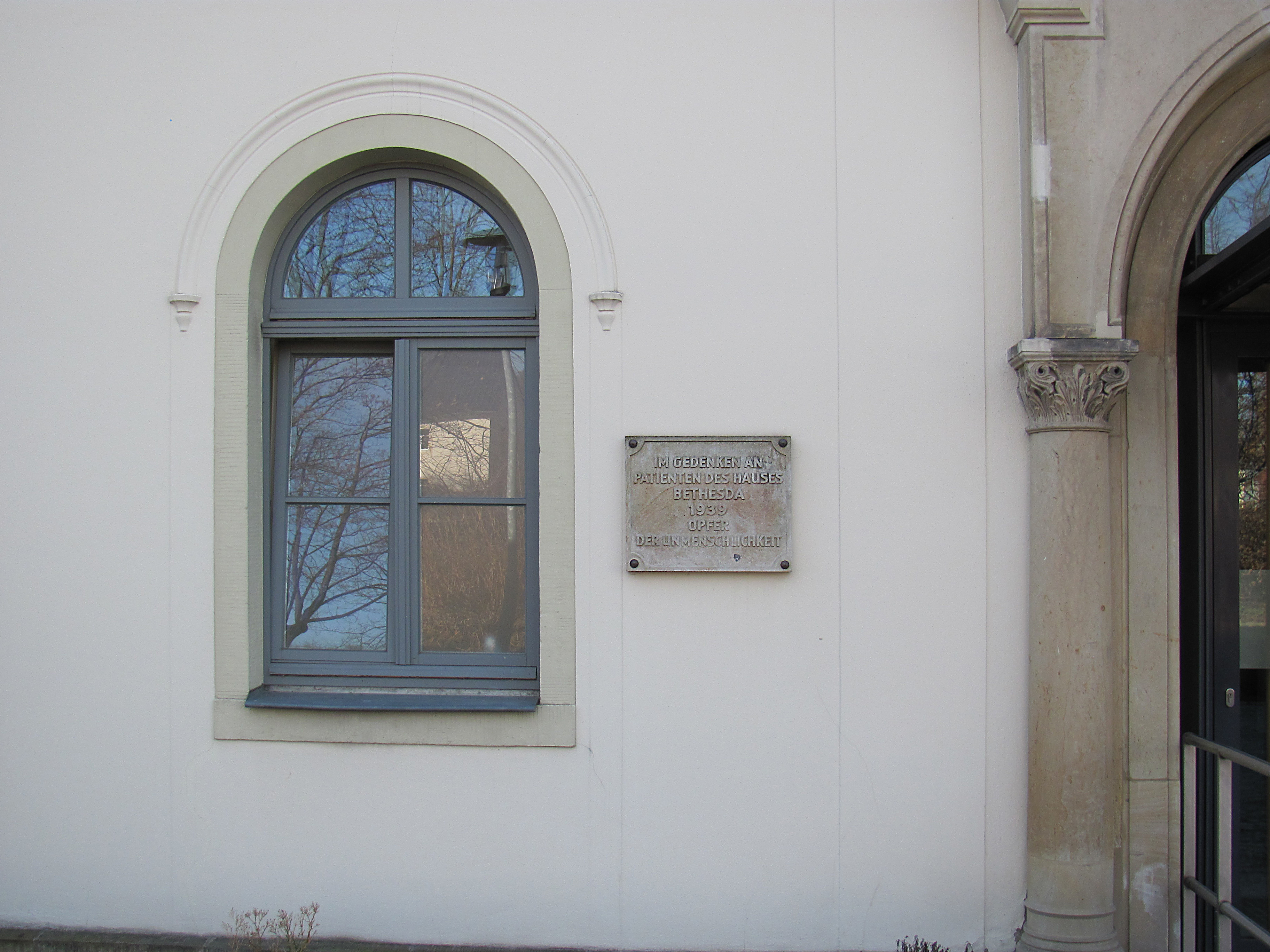 Radebeul, Elblandklinikum Radebeul, Haus 1, Gedenktafel an Euthanasieopfer